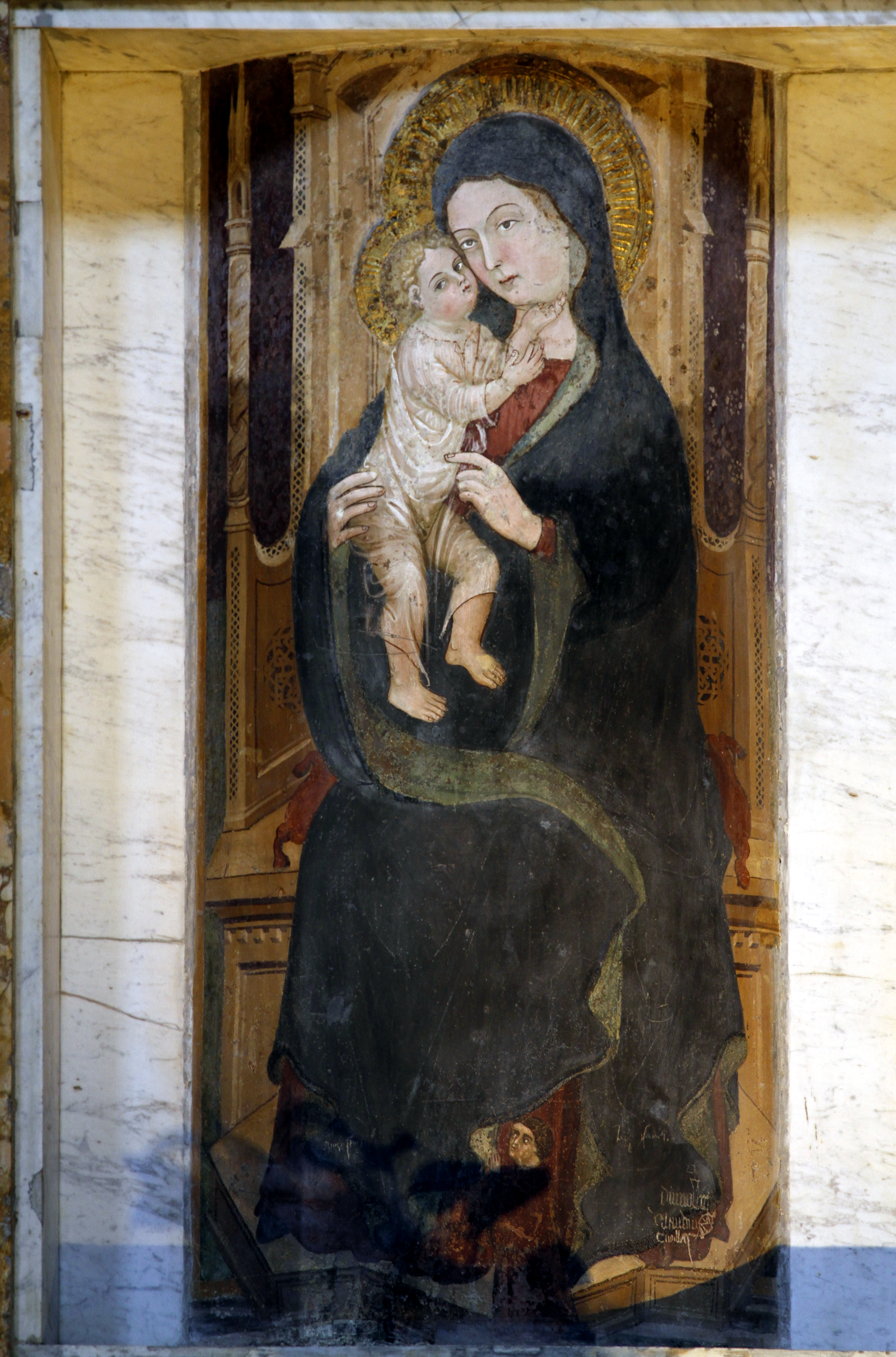 Santa Maria in Aracoeli - Rome